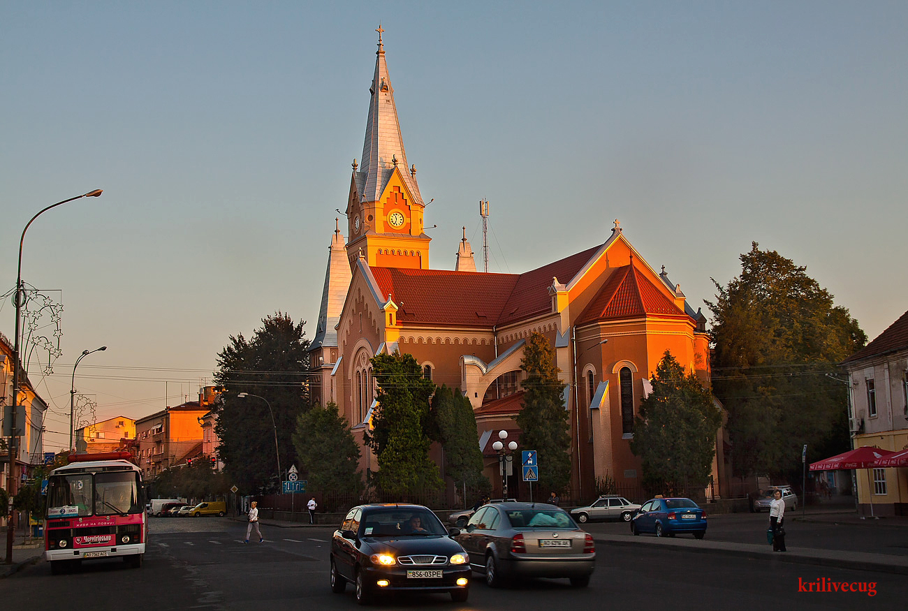 Римо-католицький храм "Хреста Спасителя". Мукачево